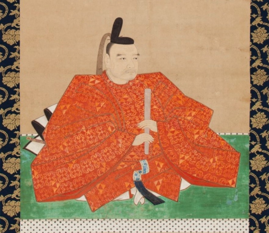 北条氏長の肖像画。